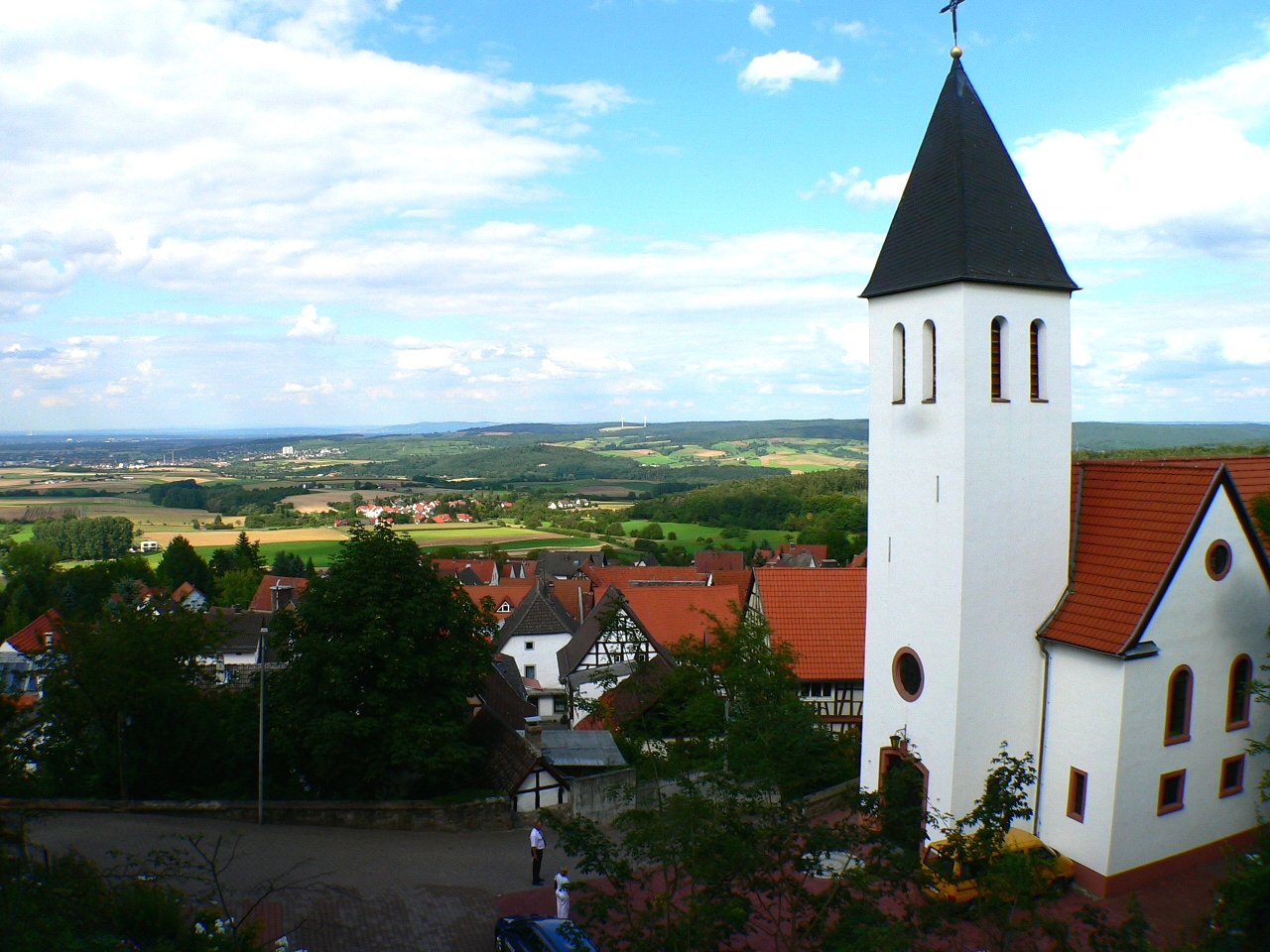 Blick auf Otzberg-Hering (Hessen) mit kath. Pfarrkirche. Im Hintergrund Groß-Umstadt